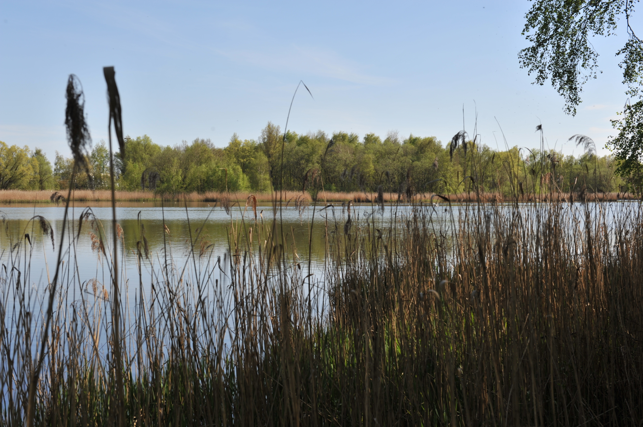 Weserportsee, Naturschutzgebiet in Bremerhaven, Deutschland